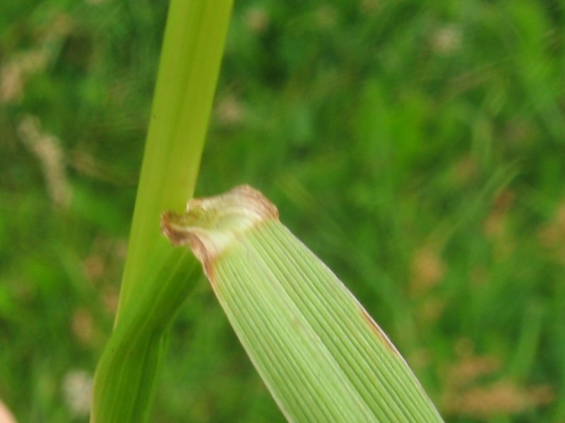 Welsches Weidelgras (Lolium multiflorum), Gragetopshof